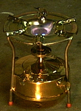 Kerosene stove